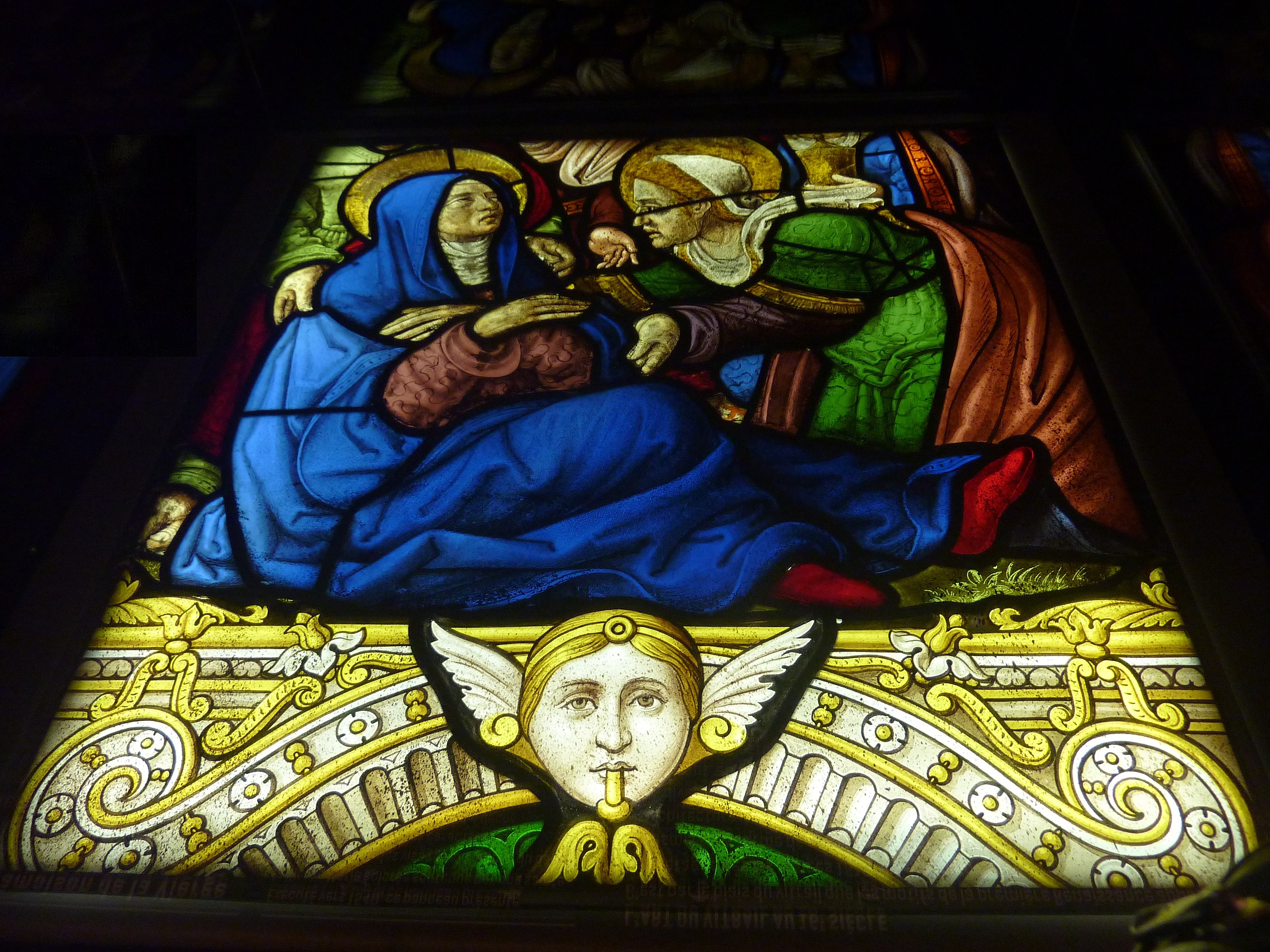 Kergloff : Pâmoison de la Vierge (vitrail de Gilles Le Sodec exécuté vers 1540) ; la Vierge éplorée est soutenue par une Sainte Femme Décor de style Renaissance. Restauré au XIXe siècle par Eugène Hucher. Classé monument historique depuis 1931.